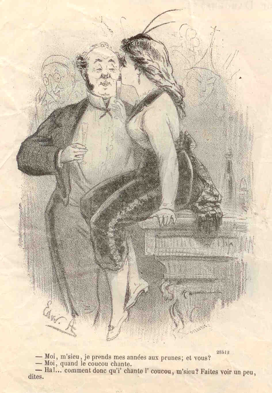 Dessin d'Edward Ancourt illustrant les bals masqués du Carnaval de Paris, extrait du Journal Amusant, numéro 737, 12 février 1870.